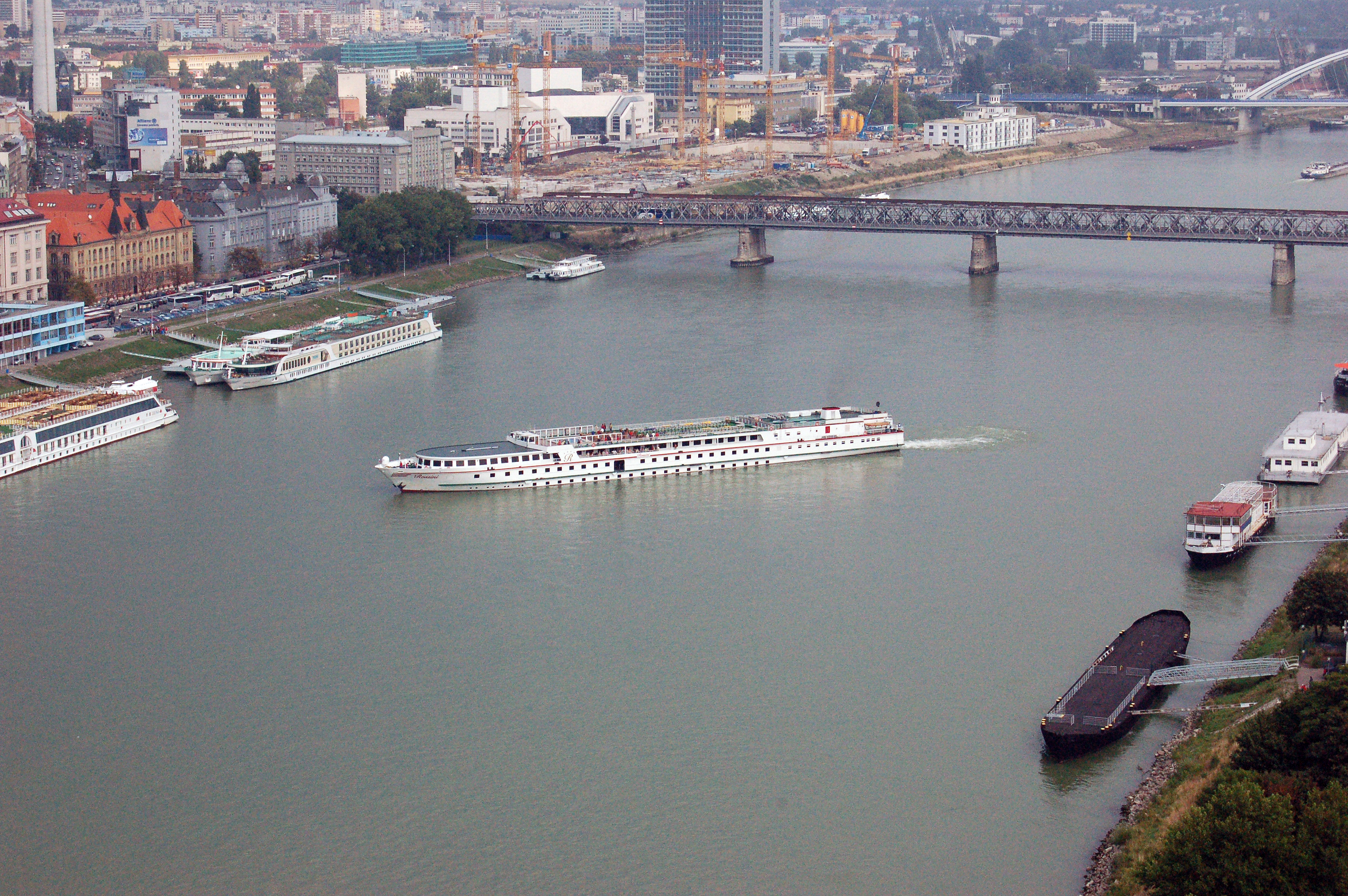 Kabinenfahrgastschiff Rossini bei einem Anlegevorgang in Bratislava